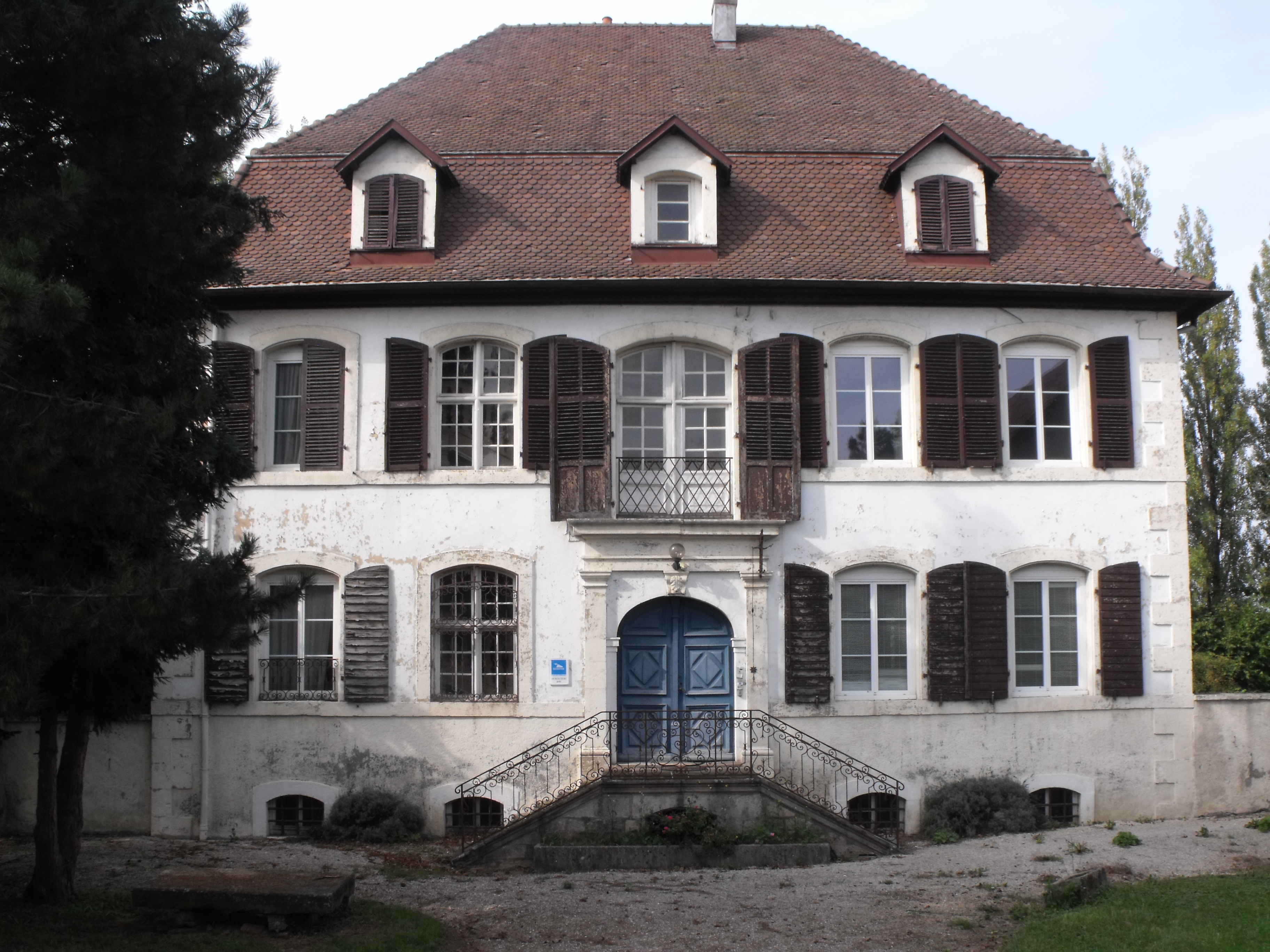 Château Sattler (Inscrit) .